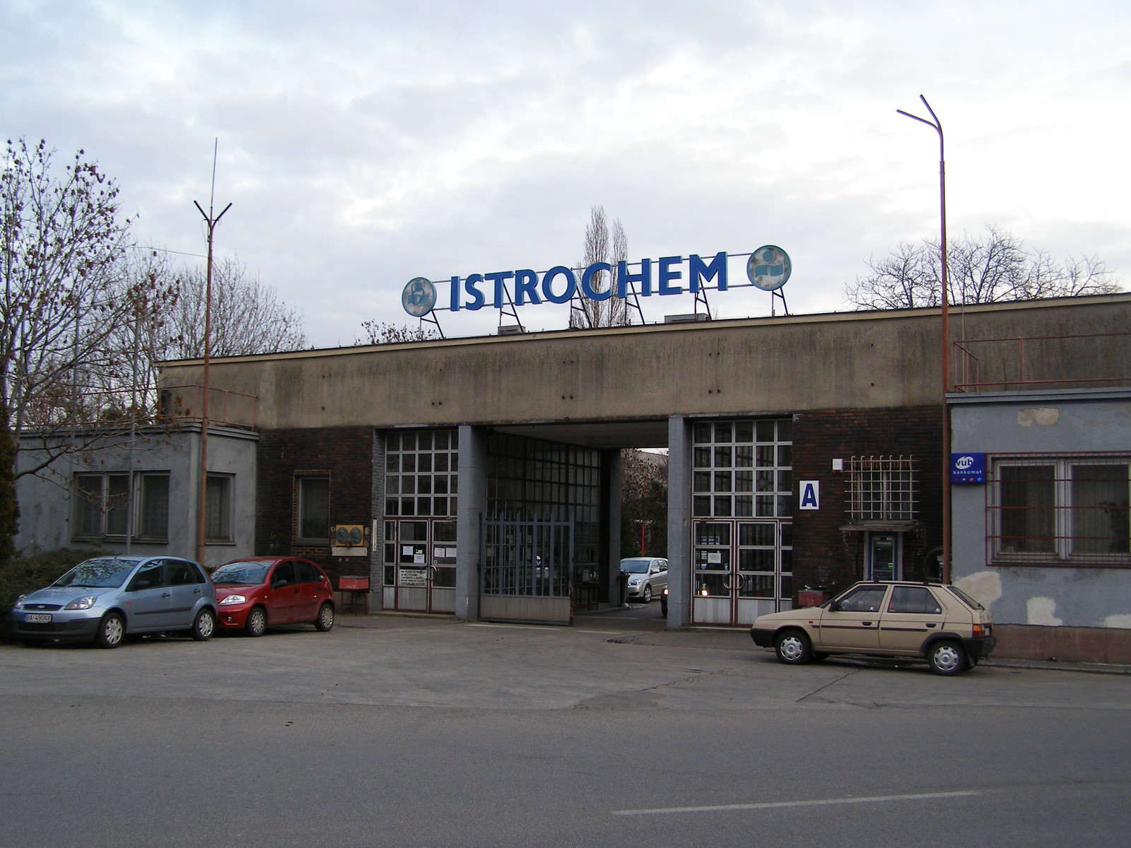 Istrochem